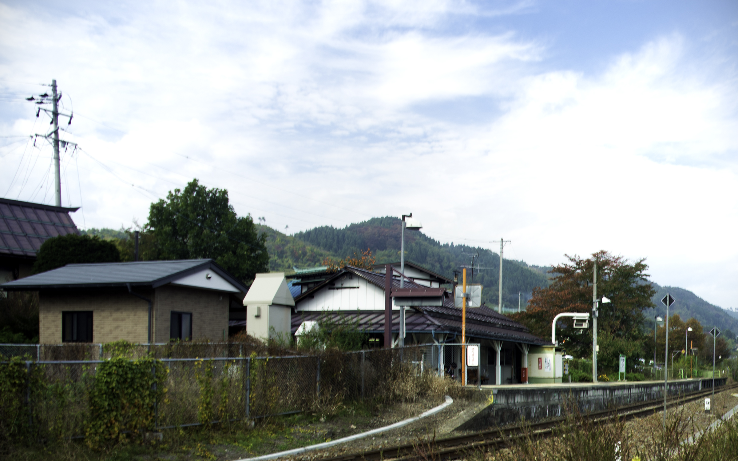 東日本旅客鉄道飯山線上今井駅駅構内